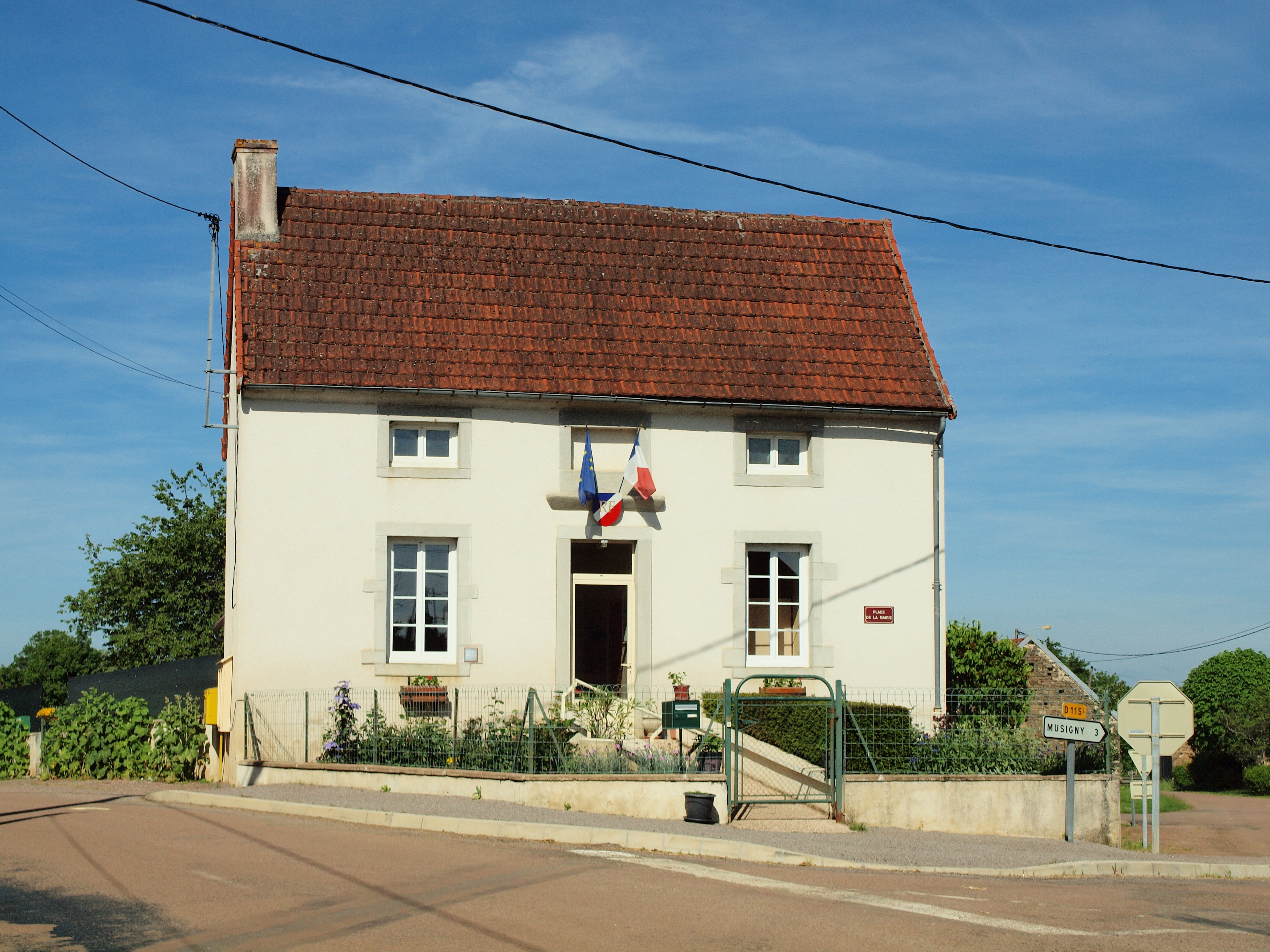 Longecourt-lès-Culêtre (Côte-d'Or, France)